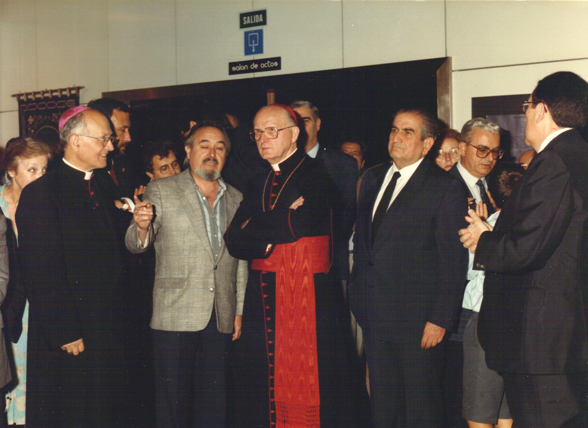 Ruizanglada 1988 entre el Arzobispo de Zaragoza Elias Yanes y el nuncio Luigi Dadaglio en la exposición Maria en el Arte.